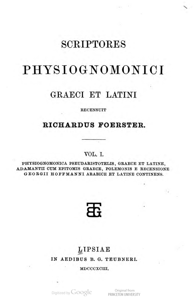 Titelblatt der zweibändigen Sammlung Scriptores physiognomonici Graeci et Latini recensuit Richardus Foerster (Leipzig 1893)